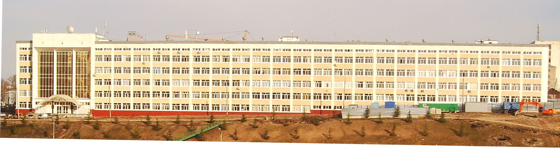 Физ-мат корпус Башкирского государственного университета